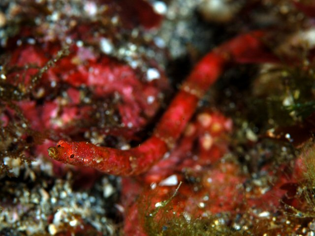 ホソウミヤッコ Halicampus boothae